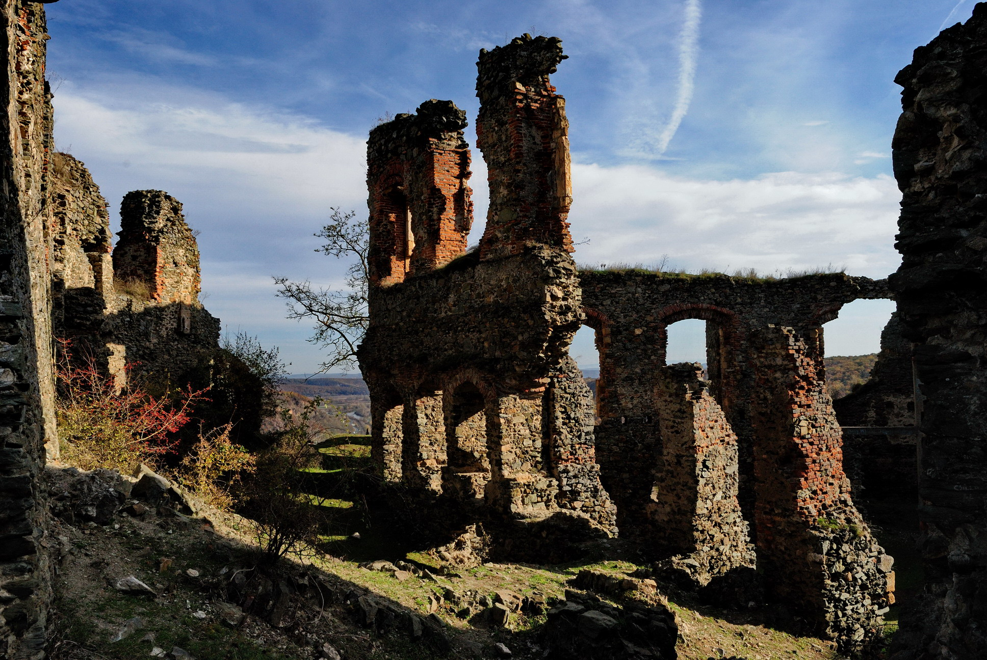 Cetatea Șoimoș (ruine)